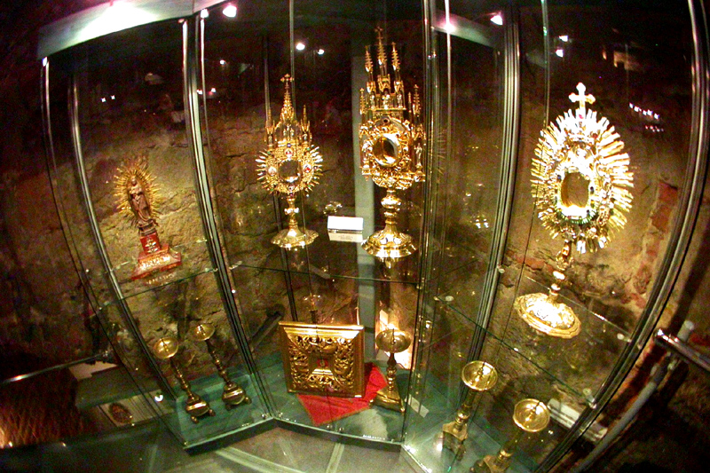 Monstranz